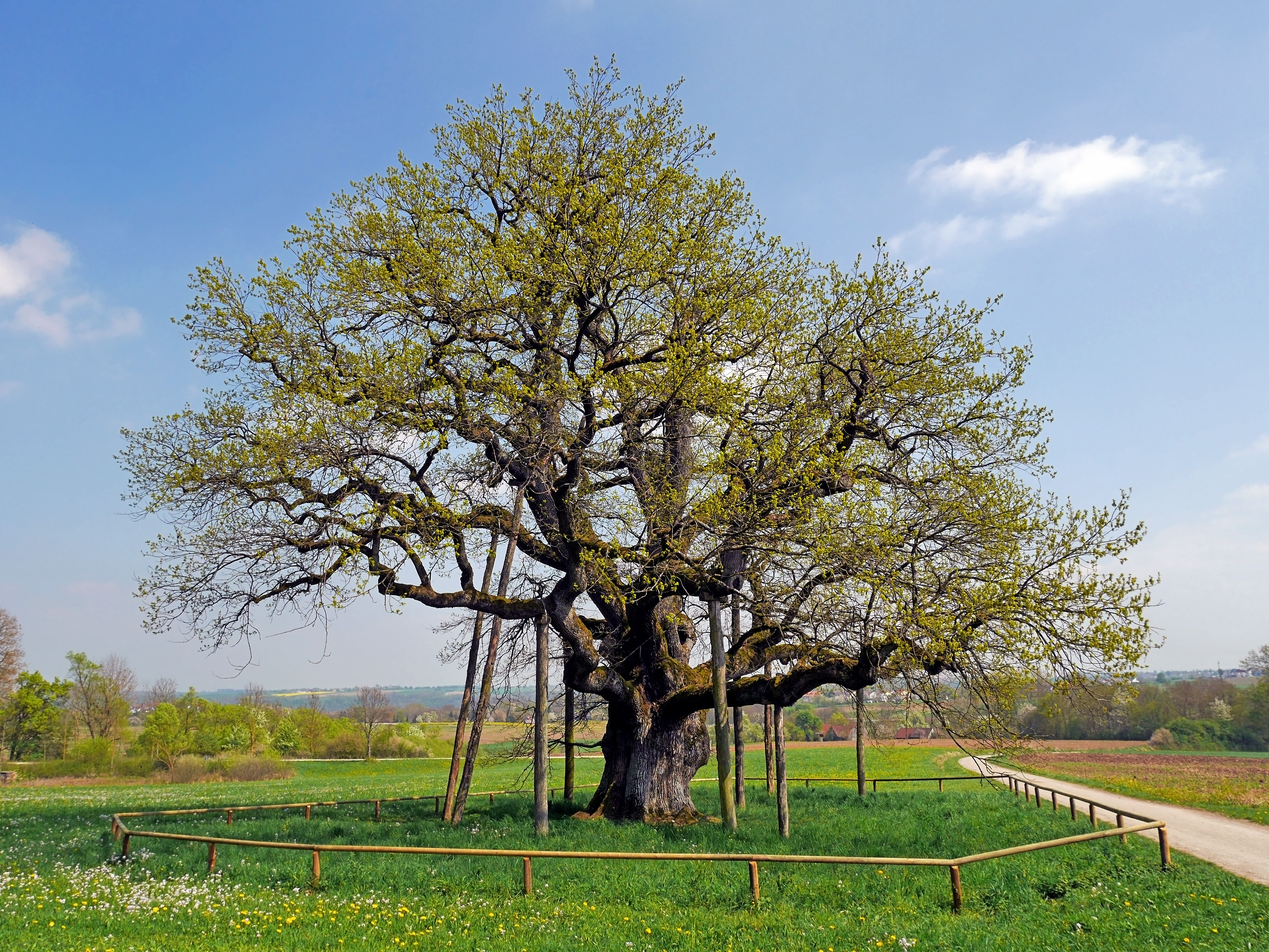 Die "Breiteiche" steht westlich von Gottwollshausen frei auf einer Wiese. Sie zählt zu den ganz wenigen Eichen in Deutschland, deren Äste abgestützt werden. 2014 lag der Umfang bei knapp 7 m, bei einer Höhe von 19 m. Die Eiche ist etwa 300 bis 400 Jahre alt.